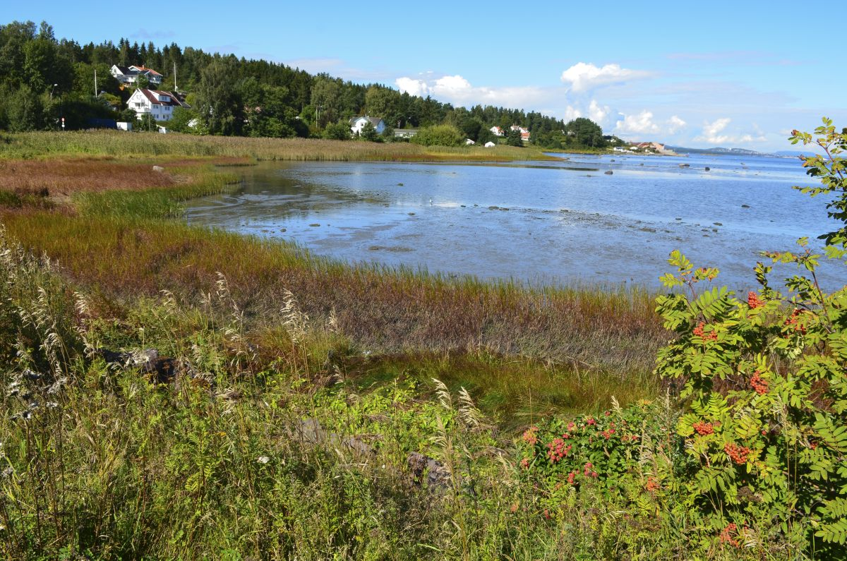 I Bliksekilen vokser den nasjonalt sjeldne planten dvergålegress.